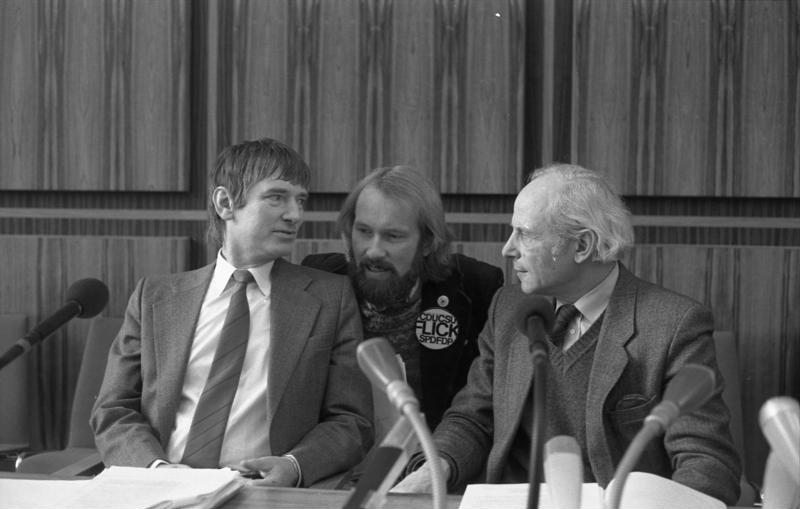 2.3.1983 Die "Grünen" geben eine Pressekonferenz zur NATO-Nachrüstung im Saal der Bundespressekonferenz